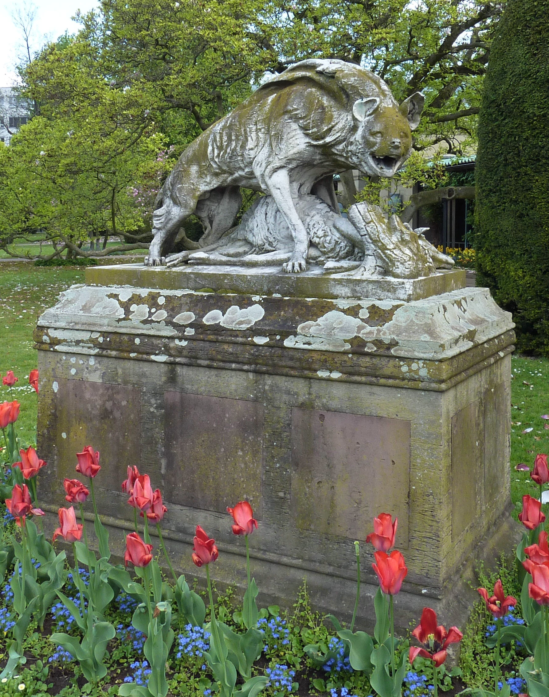 Hyänenskulptur in der Wilhelma